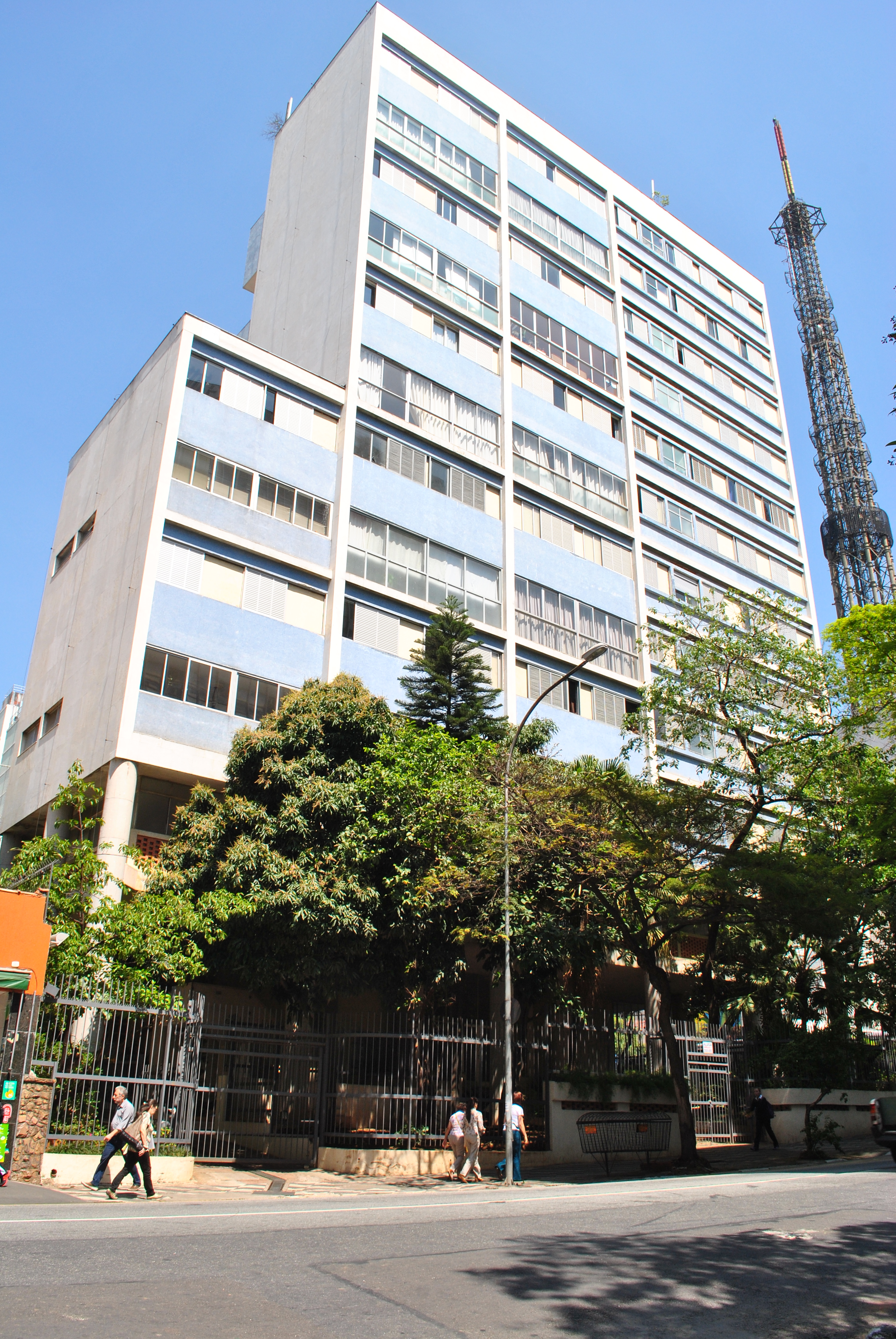 Fachada lateral do Edifício Anchieta com face para Avenida Angélica.